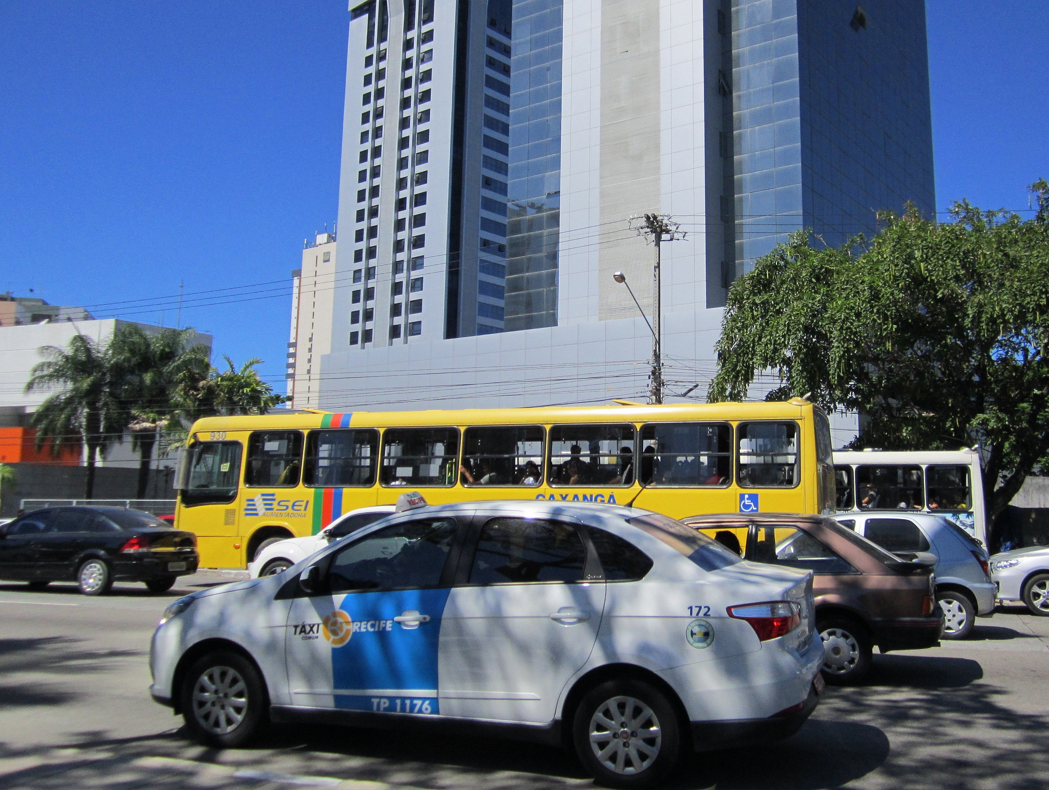 Típico táxi branco do Recife na Ilha do Leite - Recife, Pernambuco, Brasil